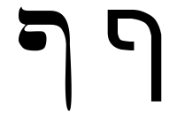 hebrew letter final pe